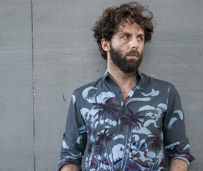 Vanni Santoni durante una presentazione a Macao, 2015